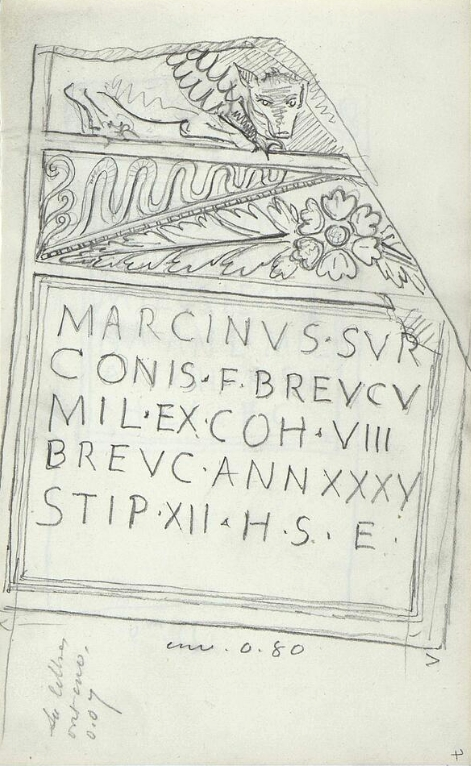 Relevé épigraphique par Pierre-Charles Robert. Carnets lègués au musée des antiquité nationales (Saint-Germain-en-Laye). N° inv : BIB9191. Répertorié : CIL, XIII, 8693